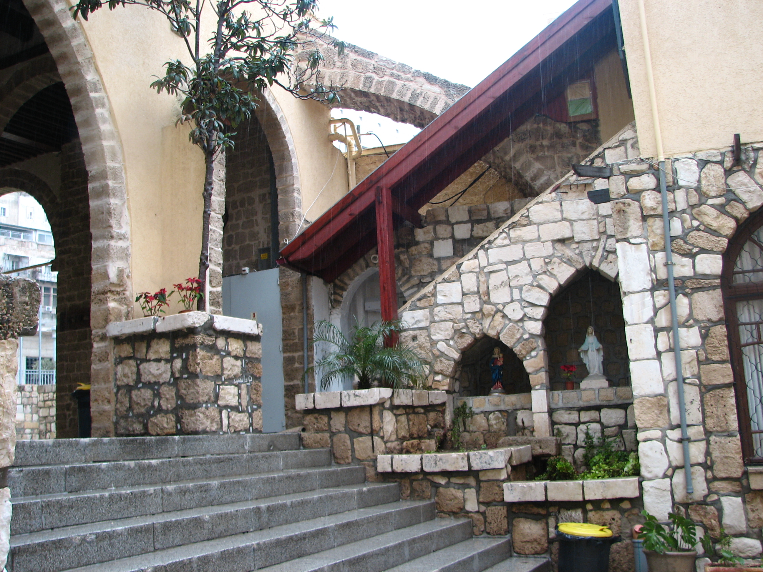 House of Grace, Haifa, Israel הכנסייה היוונית-קתולית הקימה בשנת 1862 כנסייה בשם "סנטה מריה". היום משמש הבית מוסד שיקומי לאסירים משוחררים ובית מחסה לנשים נזקקות שוכן ברחוב פל-ים בעיר התחתית בחיפה